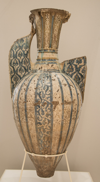 Jarrones de la Alhambra (Reino Nazarí de Granada). Número de inventario: 50419.